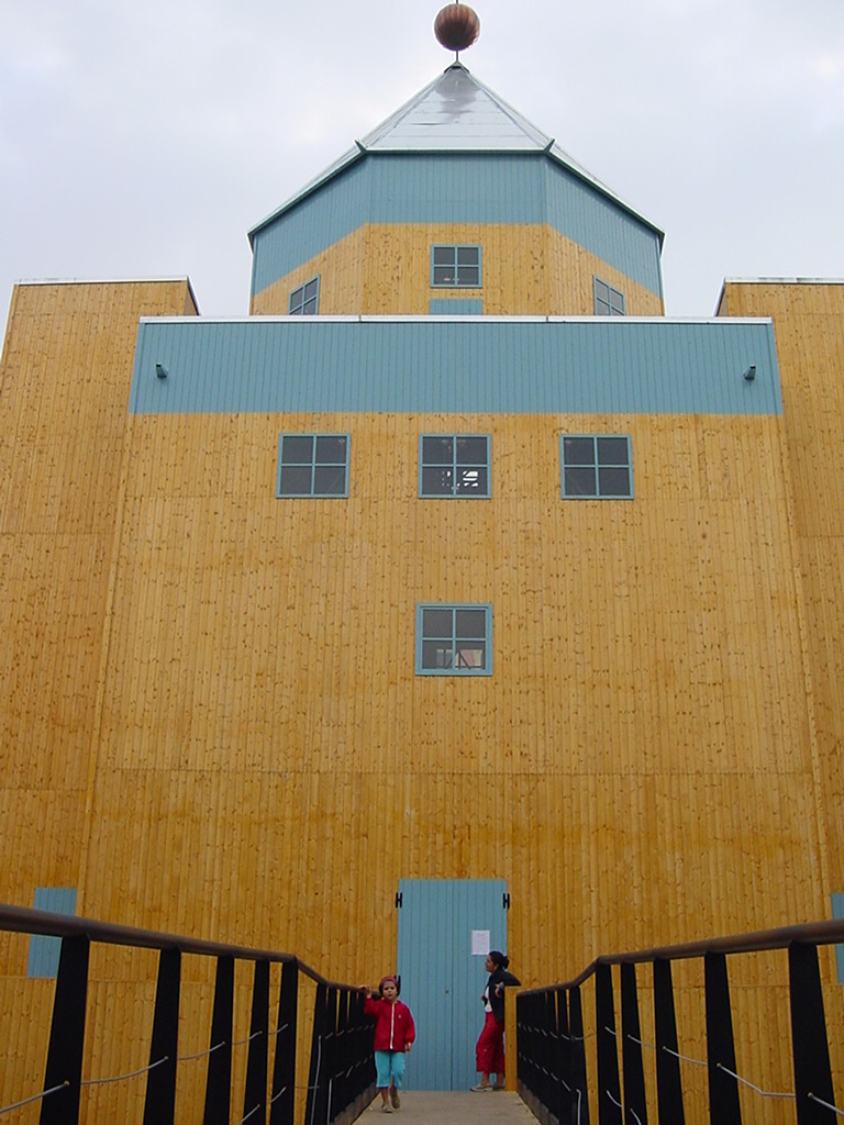 Foto realizzata a Genova in occasione della mostra dell'architettura, 1984